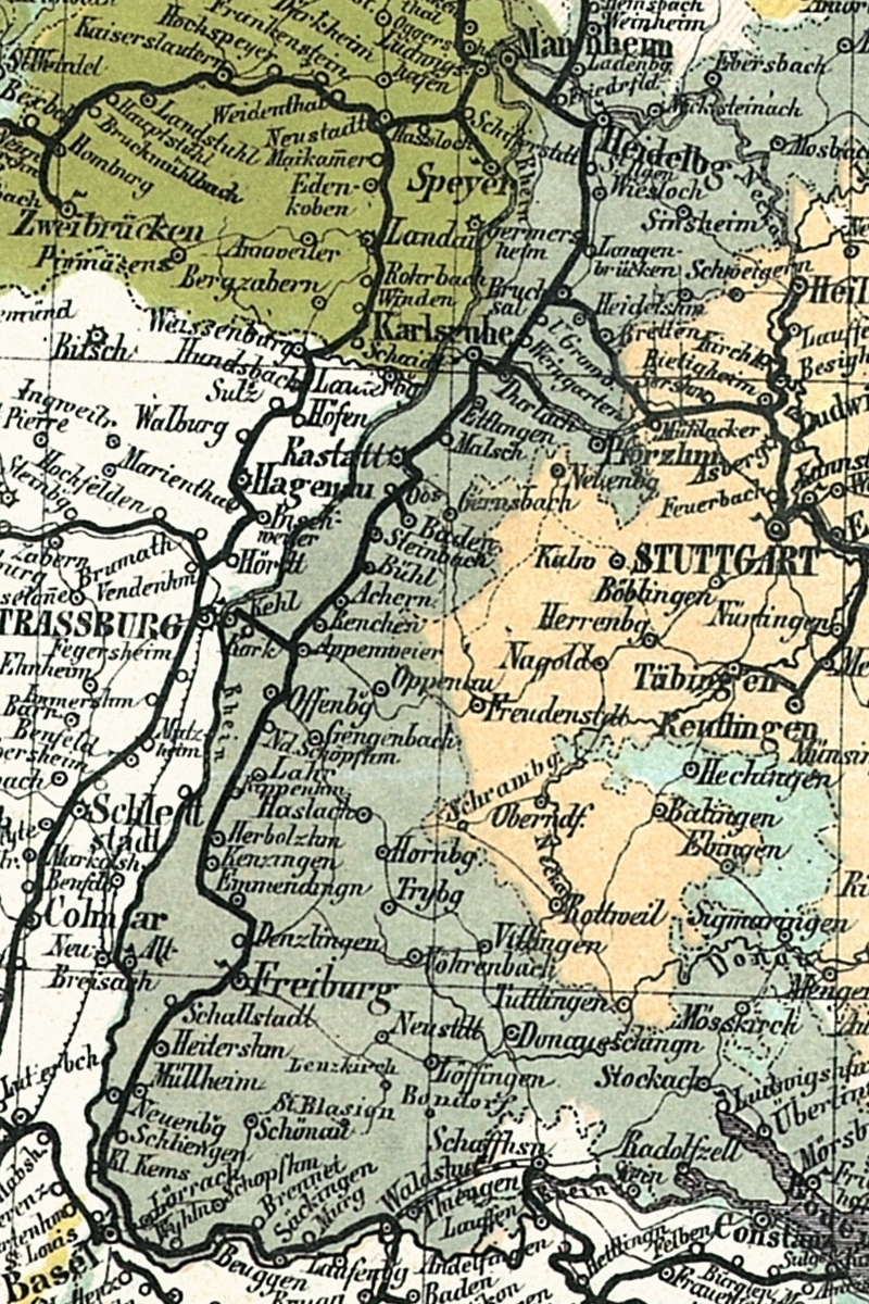 Ausschnitt Badische Hauptbahn aus der Bahnkarte_Deutschland_1861